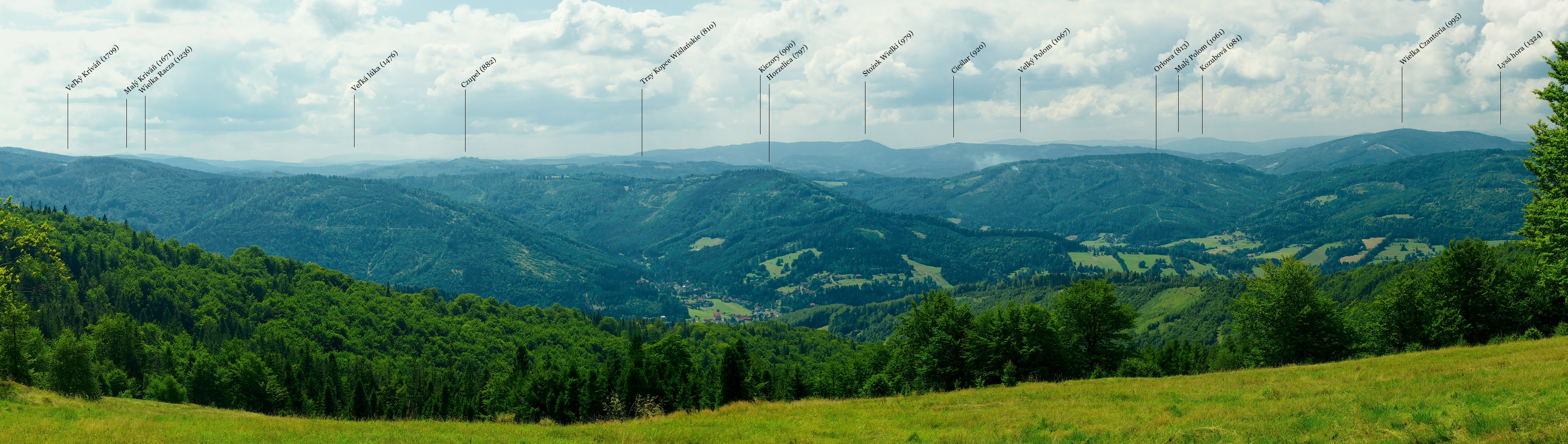 Panorama z Błotnego (Błatniej) na południowy wschód (Mała Fatra, Beskid Śląski, Beskid Morawsko Śląski)